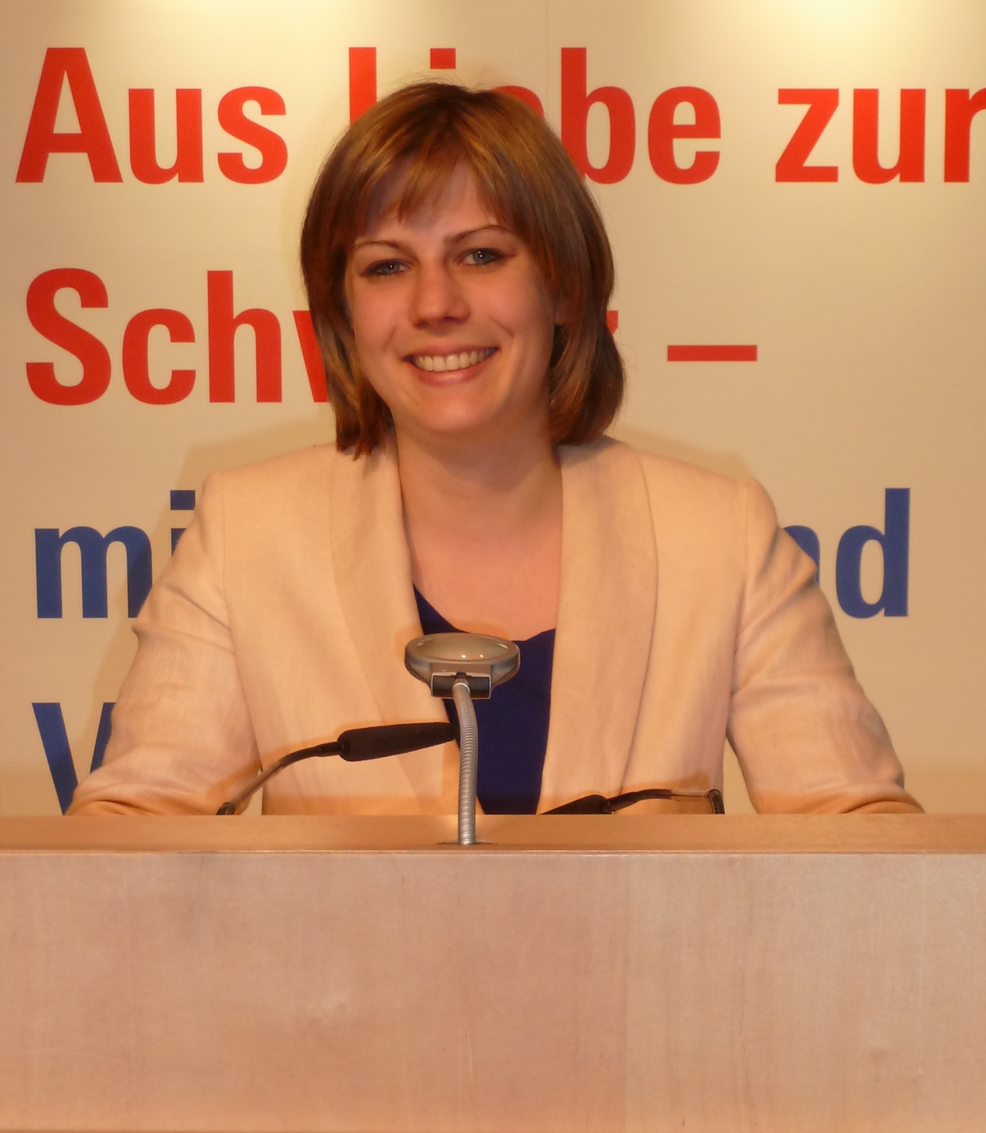 Brenda Mäder an einer FDP-Delegiertenversammlung in Luzern.